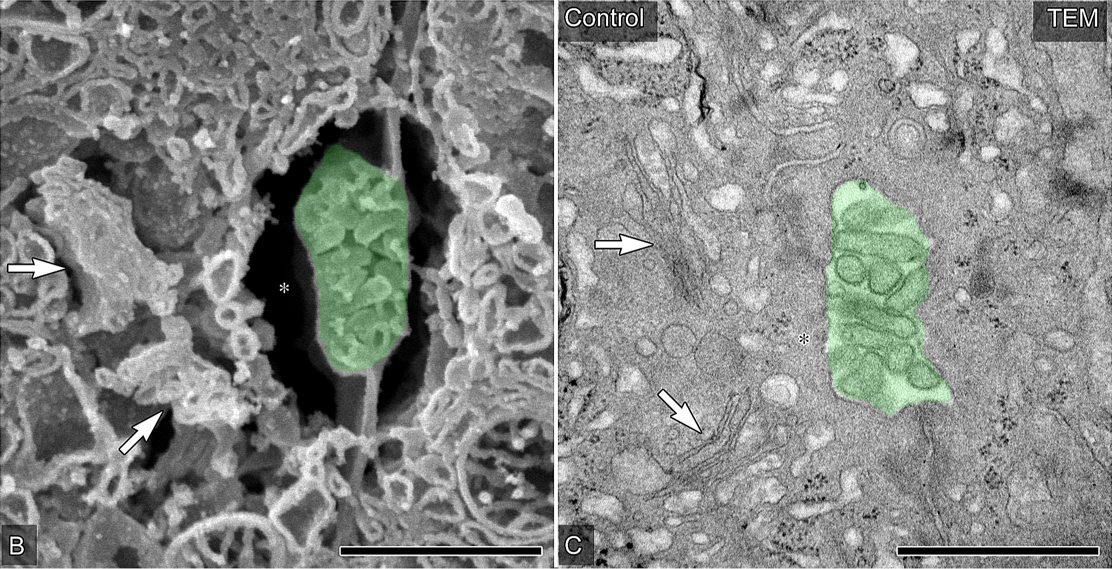 Fig. 2. La ultraestructura de los canalículos biliares en los hepatocitos porcinos del hígado de control. B) Se observaron hepatocitos representativos y canalículos biliares por SEM en muestras de injerto de hígado de cerdo de control macerado con osmio. C) Se identificaron canalículos biliares típicos en TEM las secciones ultrafinas del tejido hepático de control embebido con Epon 812. Los canalículos biliares son de color verde. Las flechas indican el aparato de Golgi, y los asteriscos indican espacios vacíos sin ningún otro organelo de endomembrana alrededor de los canalículos biliares. Barra de escala= 1 μm.